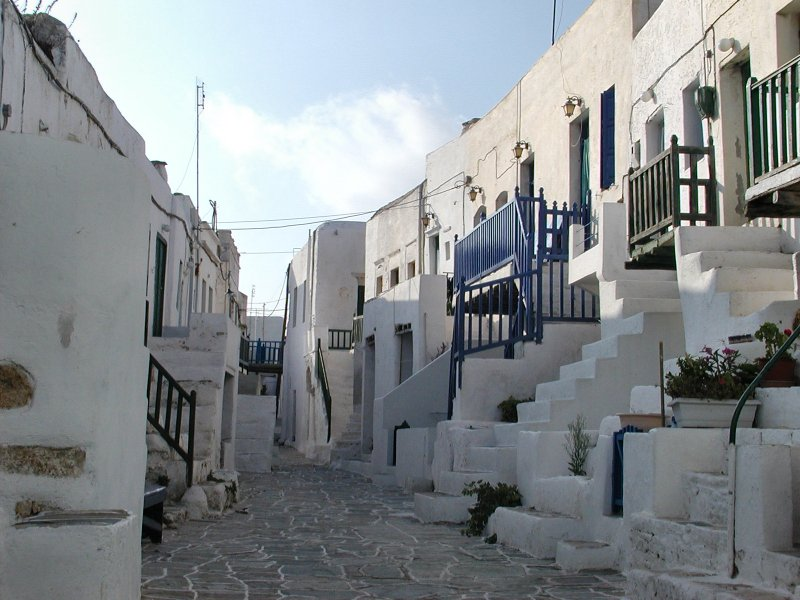 Im Kastro auf Folegandros